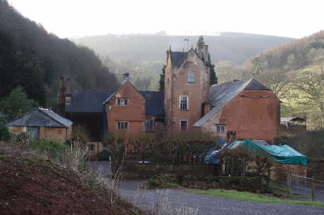 Combe Sydenham